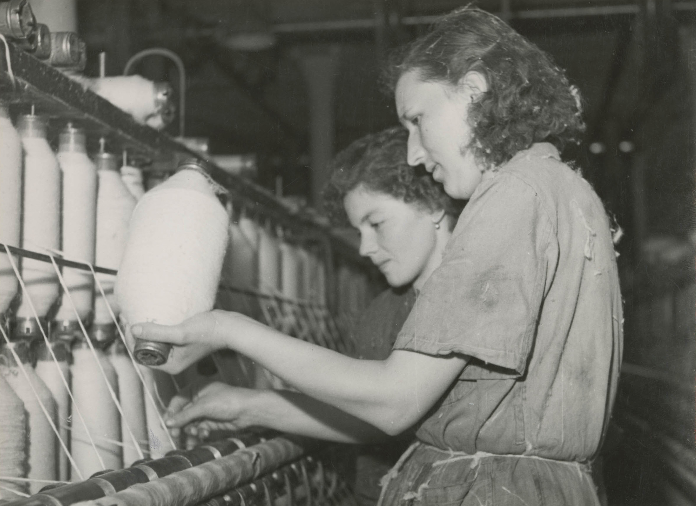 Fotografia Ignacego Płażewskiego przedstawiająca prządki stojące przy maszynie podczas pracy w jednym z łódzkich zakładów należących do sektora przemysłu włókienniczego. Kobiety ubrane są w odzież roboczą, pokrytą skrawkami przędzy. Warunki pracy kobiet w łódzkich fabrykach były bardzo ciężkie. Praca odbywała się z reguły w systemie 3-zmianowym, a włókniarki odpowiedzialne były nierzadko za obsługę dwóch bądź trzech maszyn. Po II wojnie światowej wyposażenie zakładów nie było przez dłuższy czas w większości przypadków unowocześniane, co jeszcze bardziej pogarszało warunki pracy.